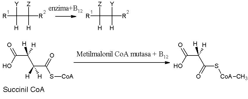 Reacción típica de una isomerasa